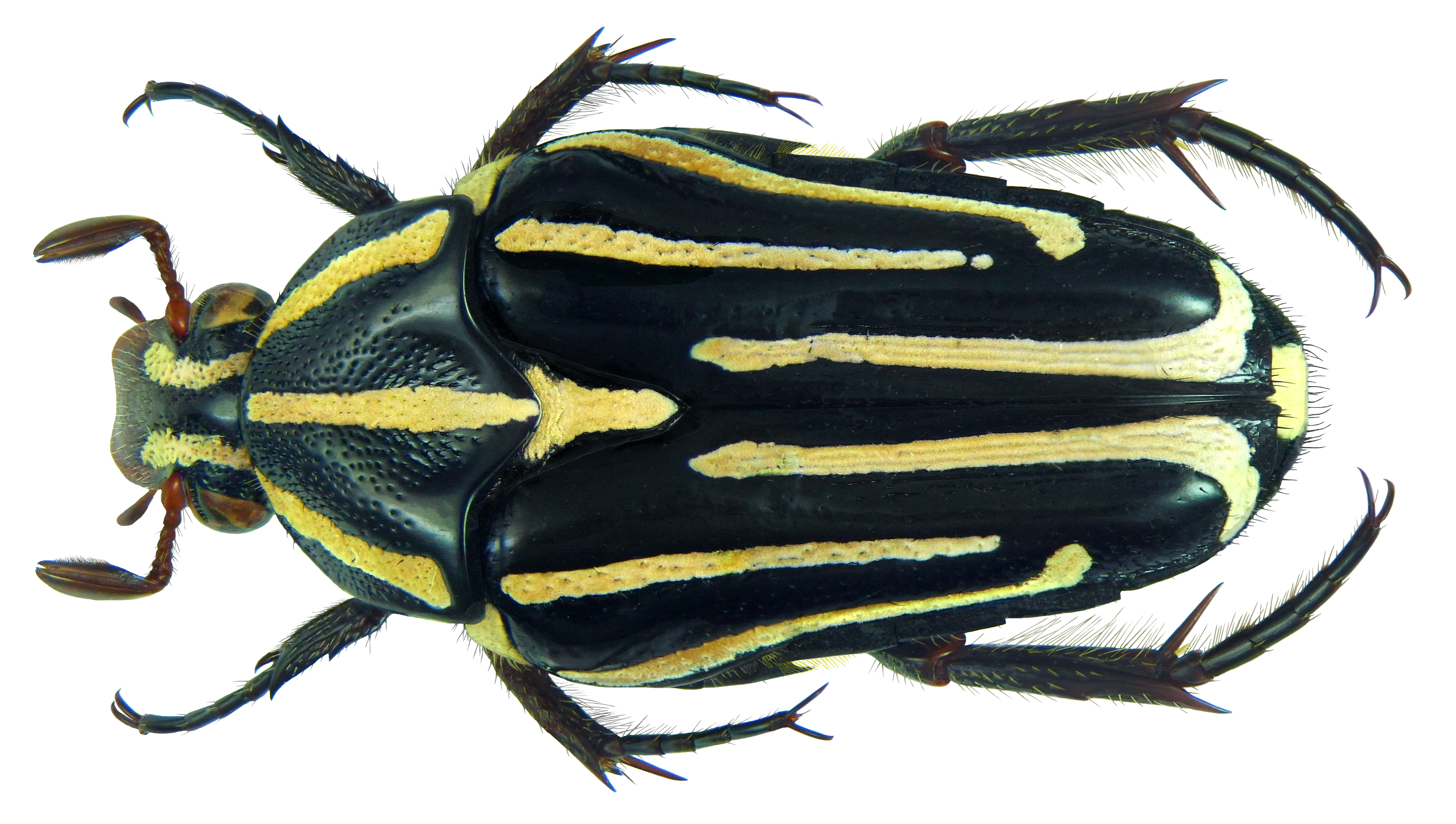 Familie: Scarabaeidae Groesse: 15,3 mm (13,8-15,7mm) Verbreitung: Sulawesi Fundort: Indonesien, Sulawesi, Lagego leg. local collectors, 20.X.2002; det. U.Schmidt, 2013 Photo: U.Schmidt, 2013